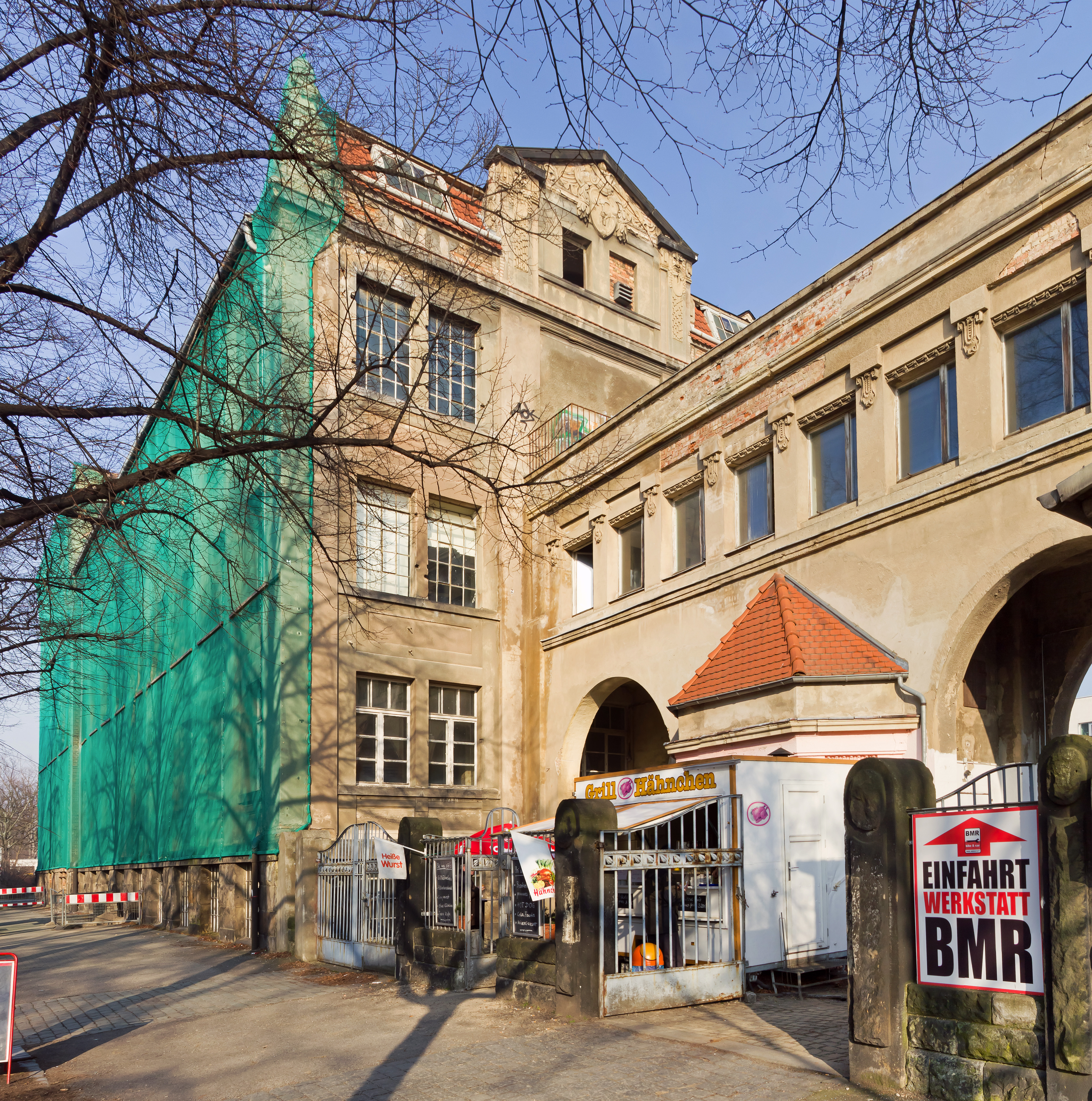 Fassade und Hofeinfahrt der ehemaligen Schuhcreme-Fabrik Eg-Gü in Dresden